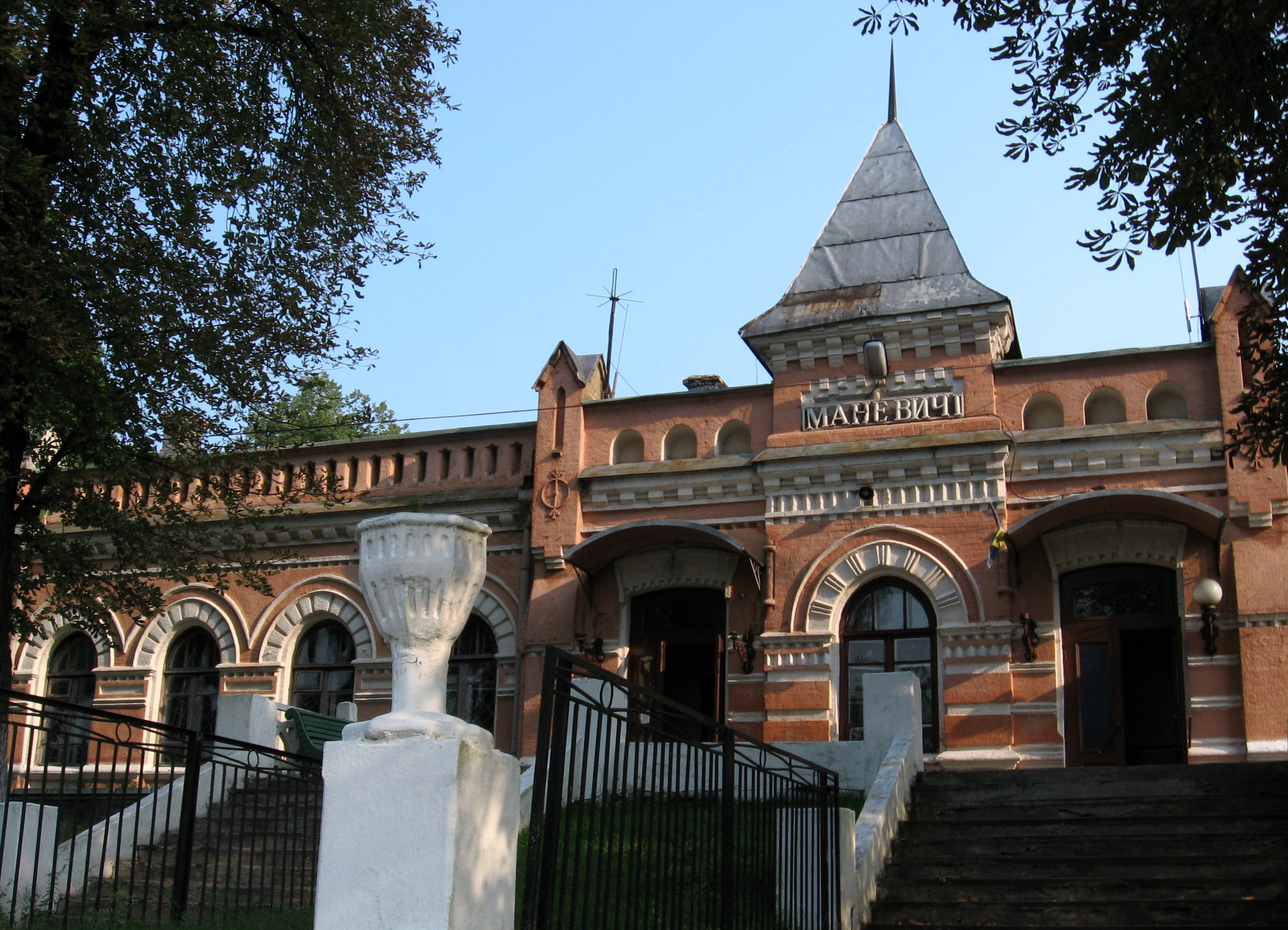 Залізничний вокзал у Маневичах